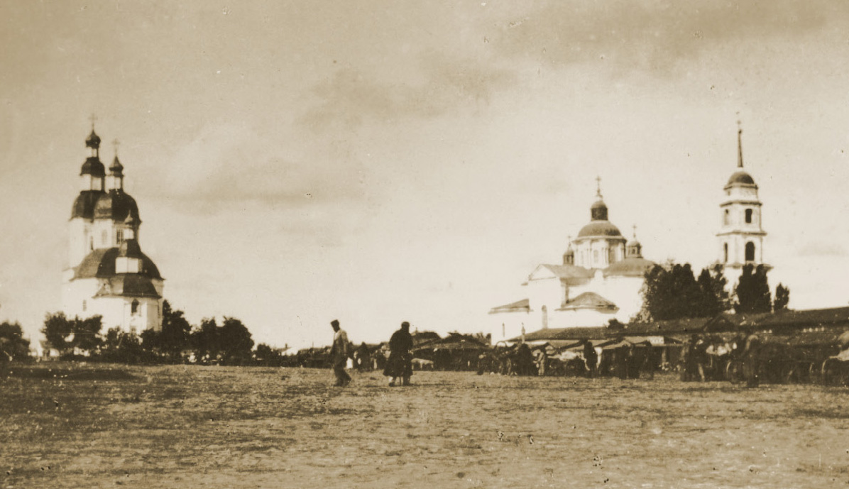 Радний майдан у Глухові: зліва Миколаївська церква, справа - Троїцький собор та дзвіниця